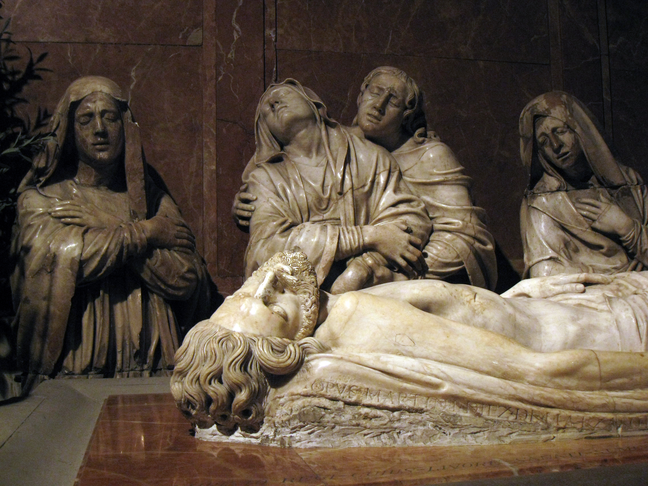 Catedral del Sant Esperit (Terrassa), el_Sant_Enterrament_de_Martín_Díez de Liatzasolo (1544)